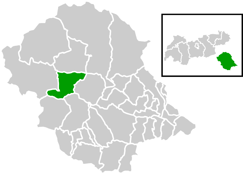 Lage der Gemeinde innerhalb des Bezirks Lienz